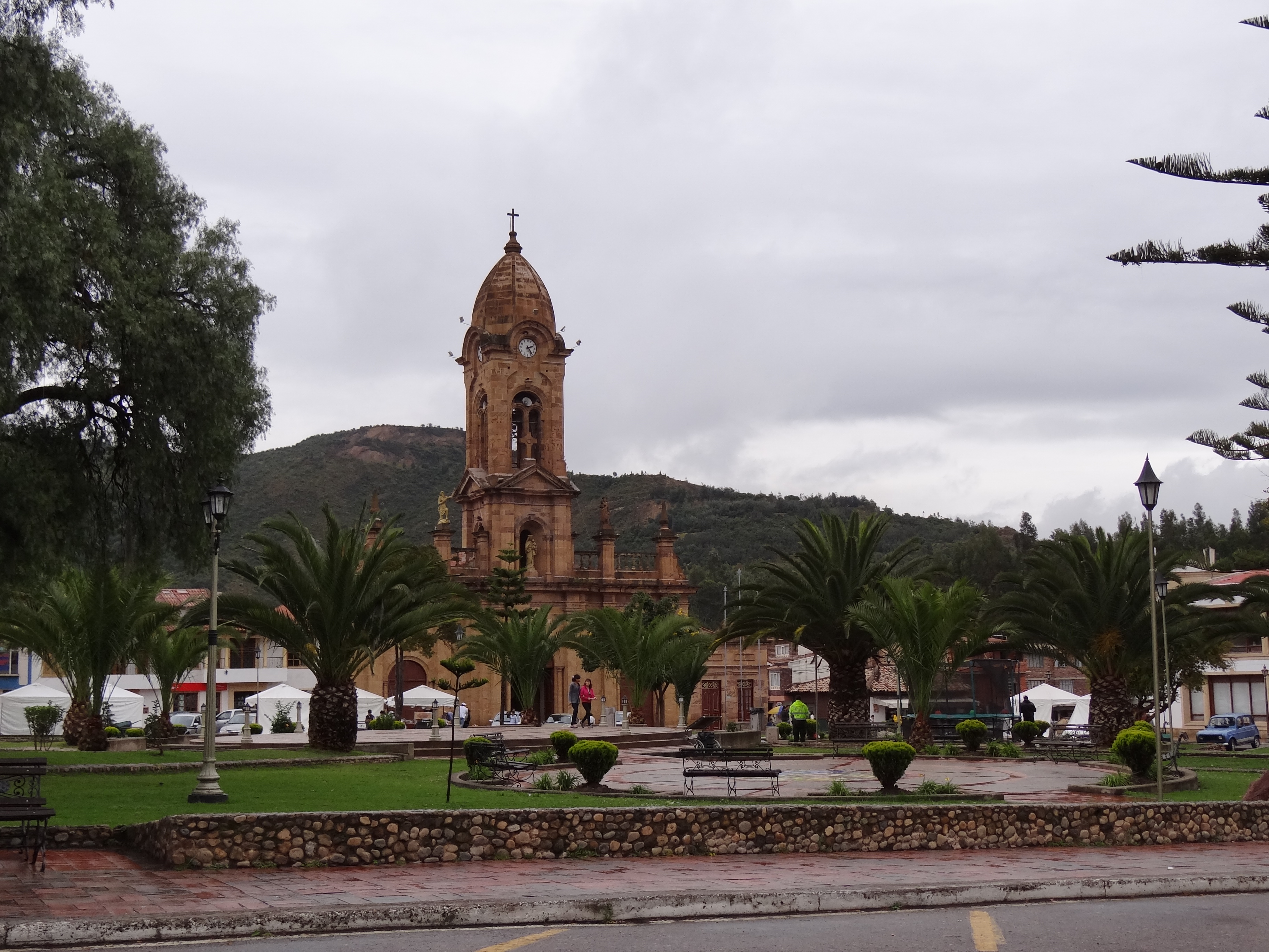 Parque principal del municipio de Nobsa, departamento de Boyacá, Colombia